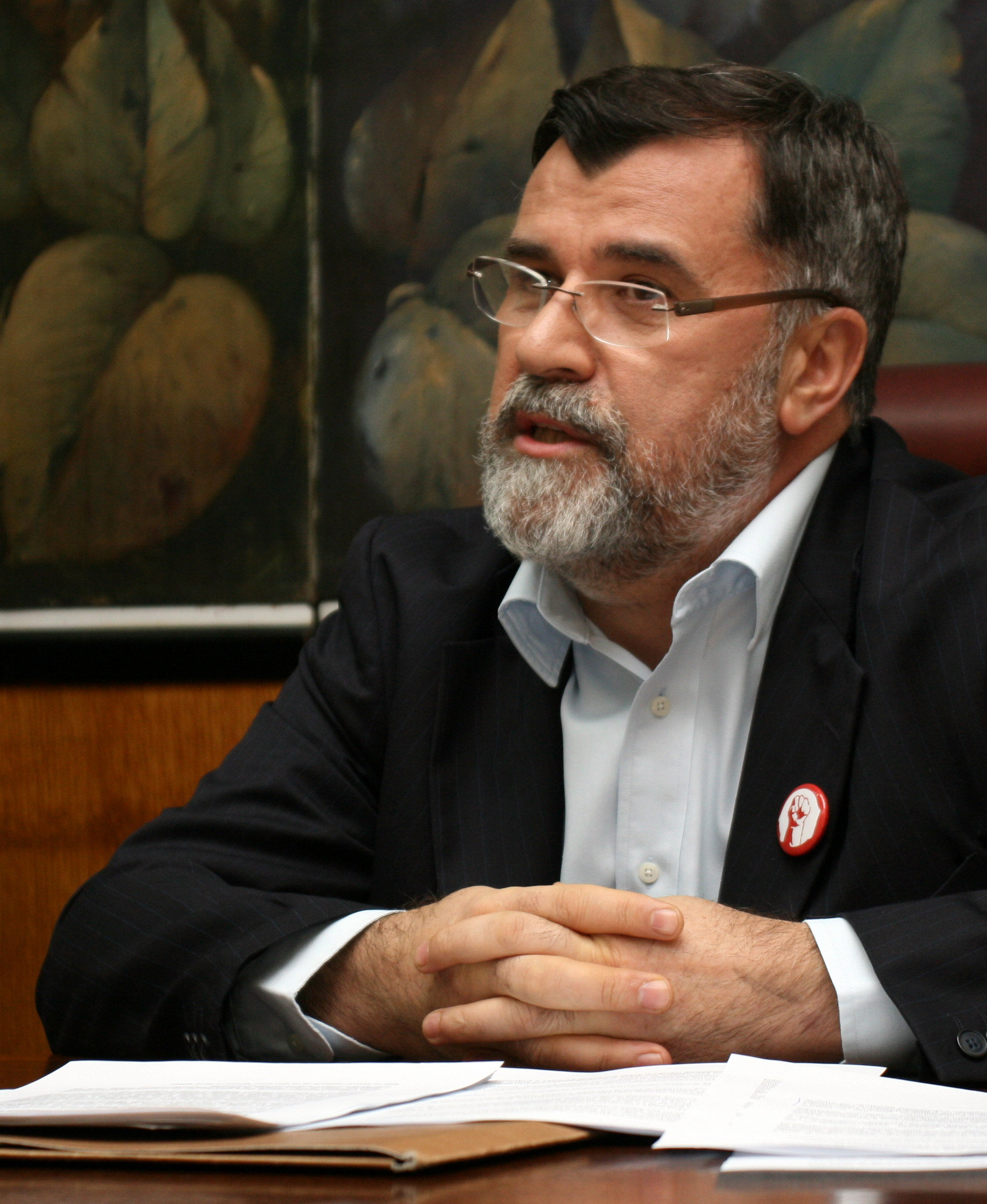 Veran Matić, novembar 2011. godine. Slika je preuzeta sa Multimedijalnog portala APV.